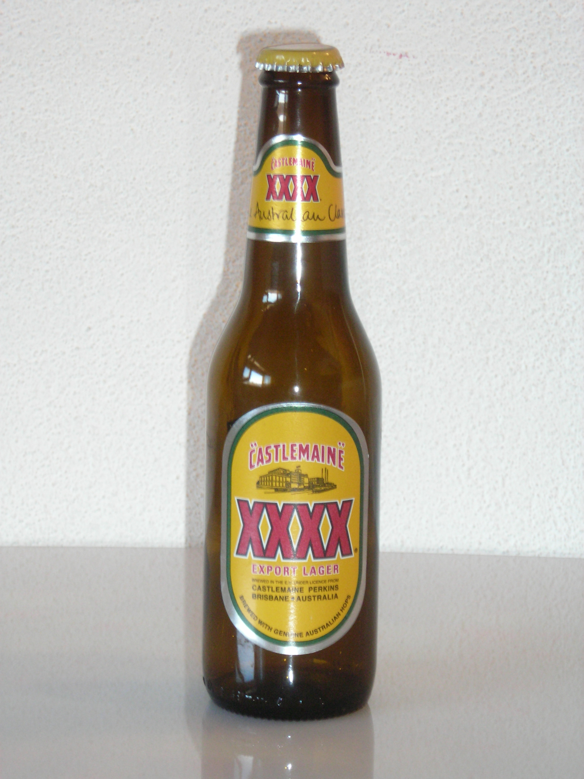 Botiglia di birra XXXX